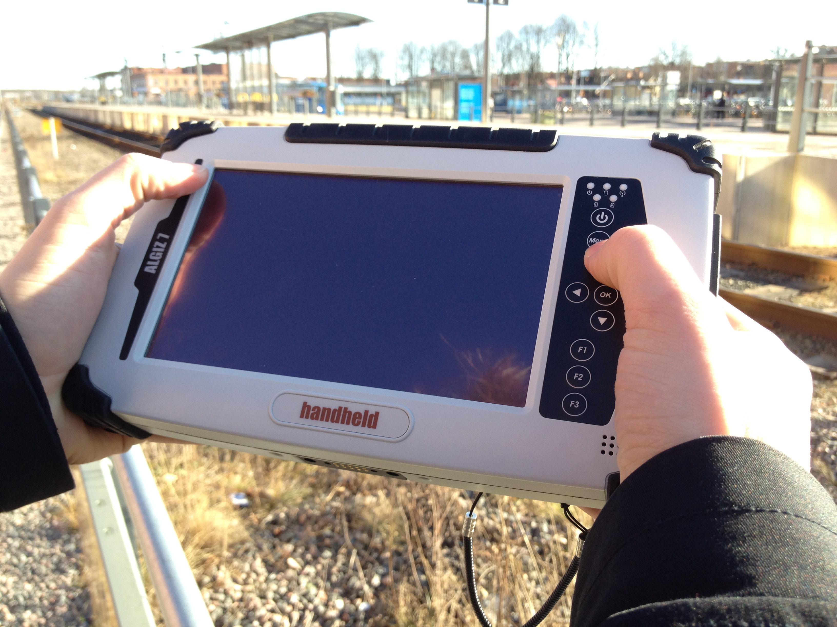 Bild på en stryktålig bärbar dator